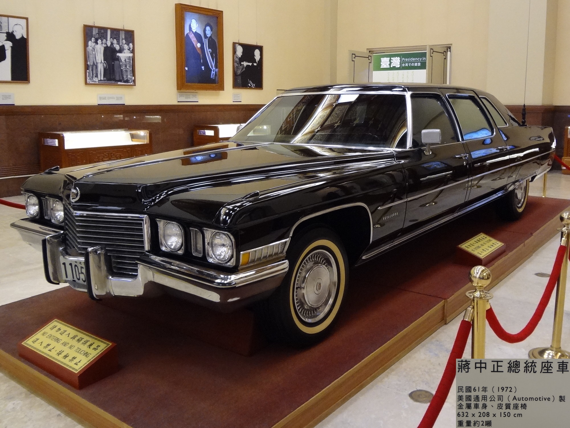 國立中正紀念堂展示的1972年蔣中正總統座車。